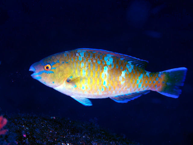 ヒブダイ Scarus ghobban